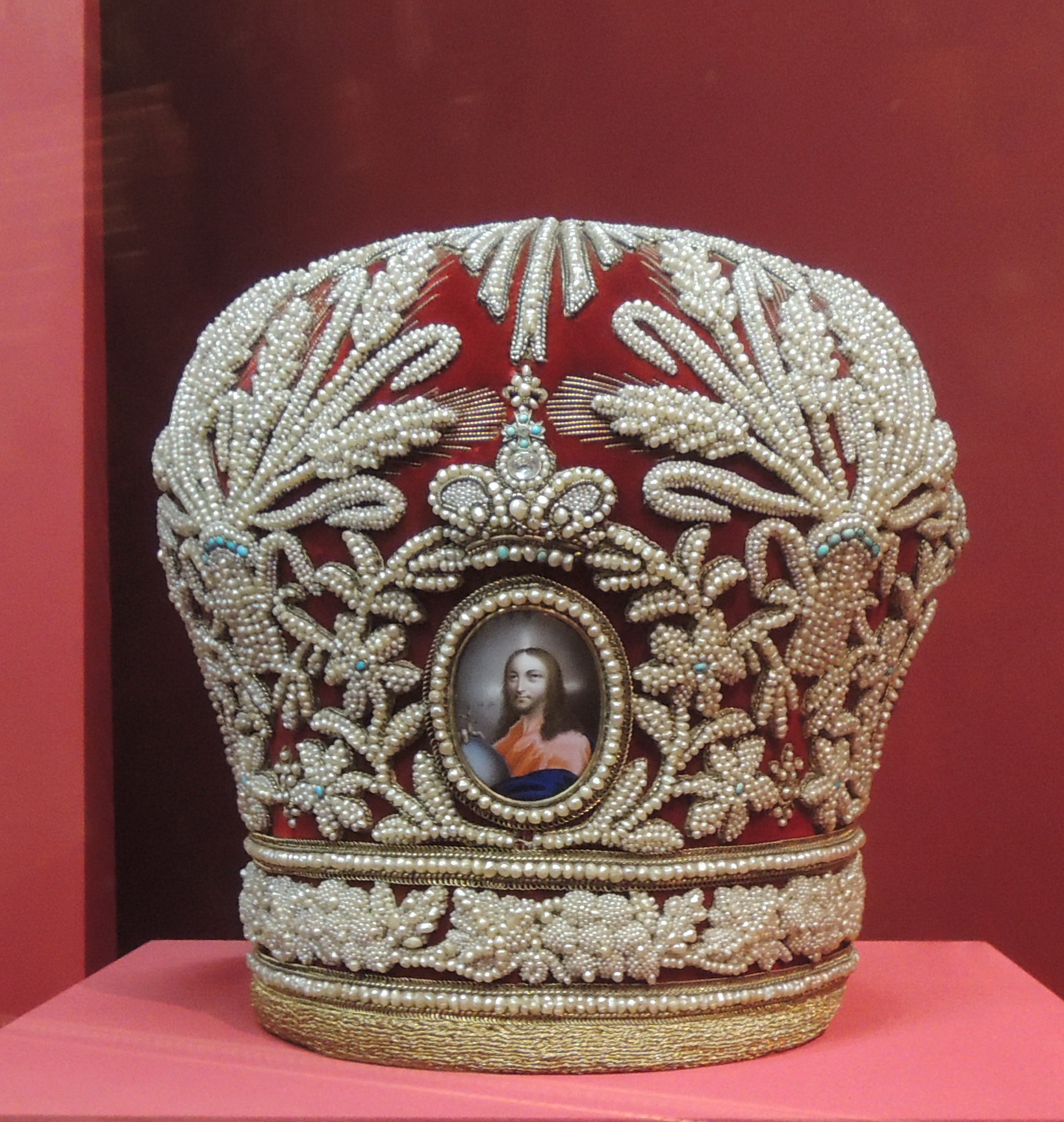 Митра, 19 век. ММК. Из красного бархата. Возможно, была использована протопресвитером Успенского собора Николаем Световидовым-Платоновым во время коронации Николая II.